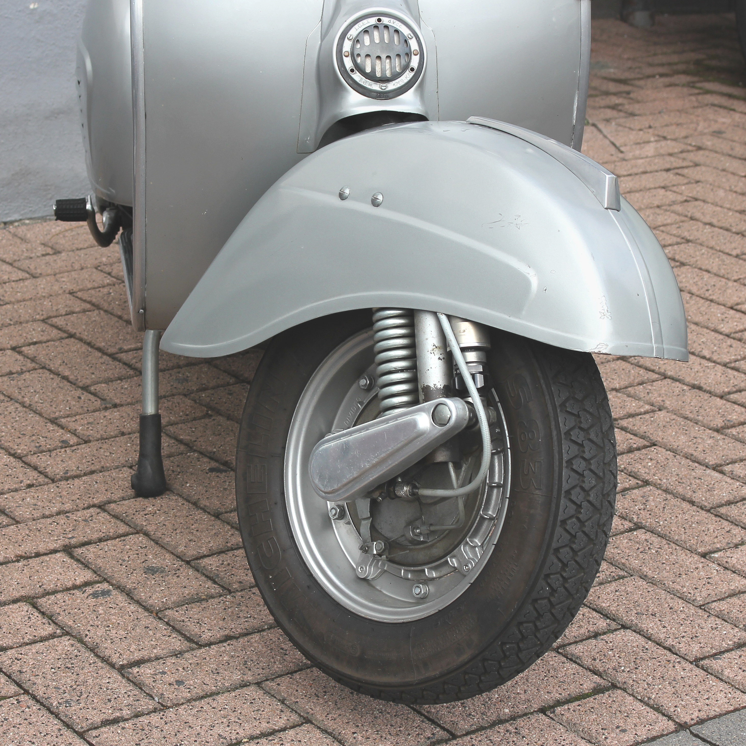 Vorderradaufhängung der Vespa 150 Sprint V., Bauzeit 1969 bis 1979. Fotografiert bei einer Ausstellung des AC Mülheim-Kärlich anlässlich des Stadtfestes